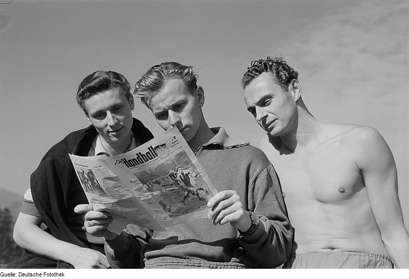 Original image description from the Deutsche FotothekPortrait Hans Haberhauffes, Paul Tiedemanns und eines weiteren Mannes bei der Lektüre der Zeitung "Der Handball" auf dem Sportplatz der Sportschule